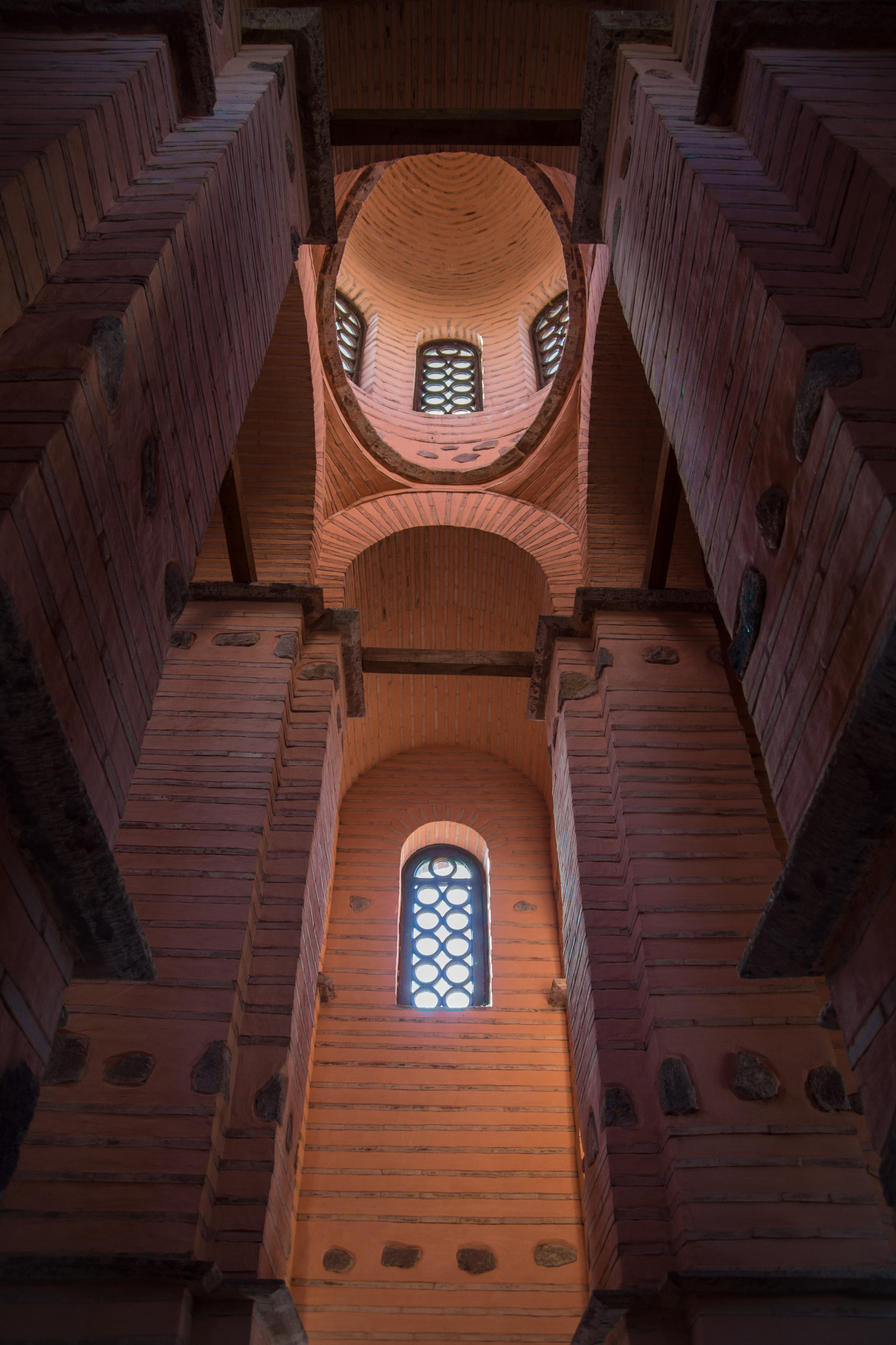 Puerta Dorada Altura